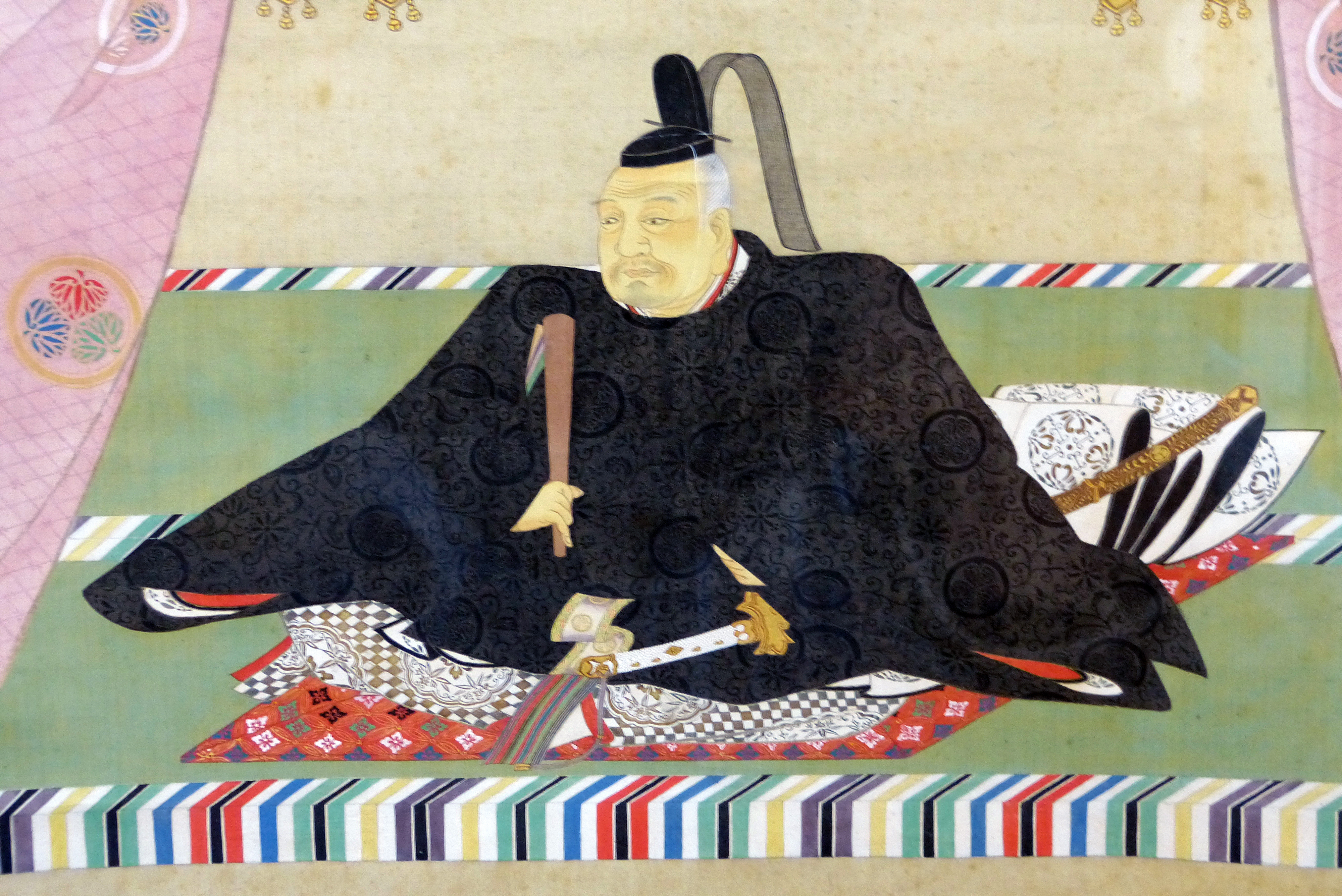 徳川家康 狩野寿信筆